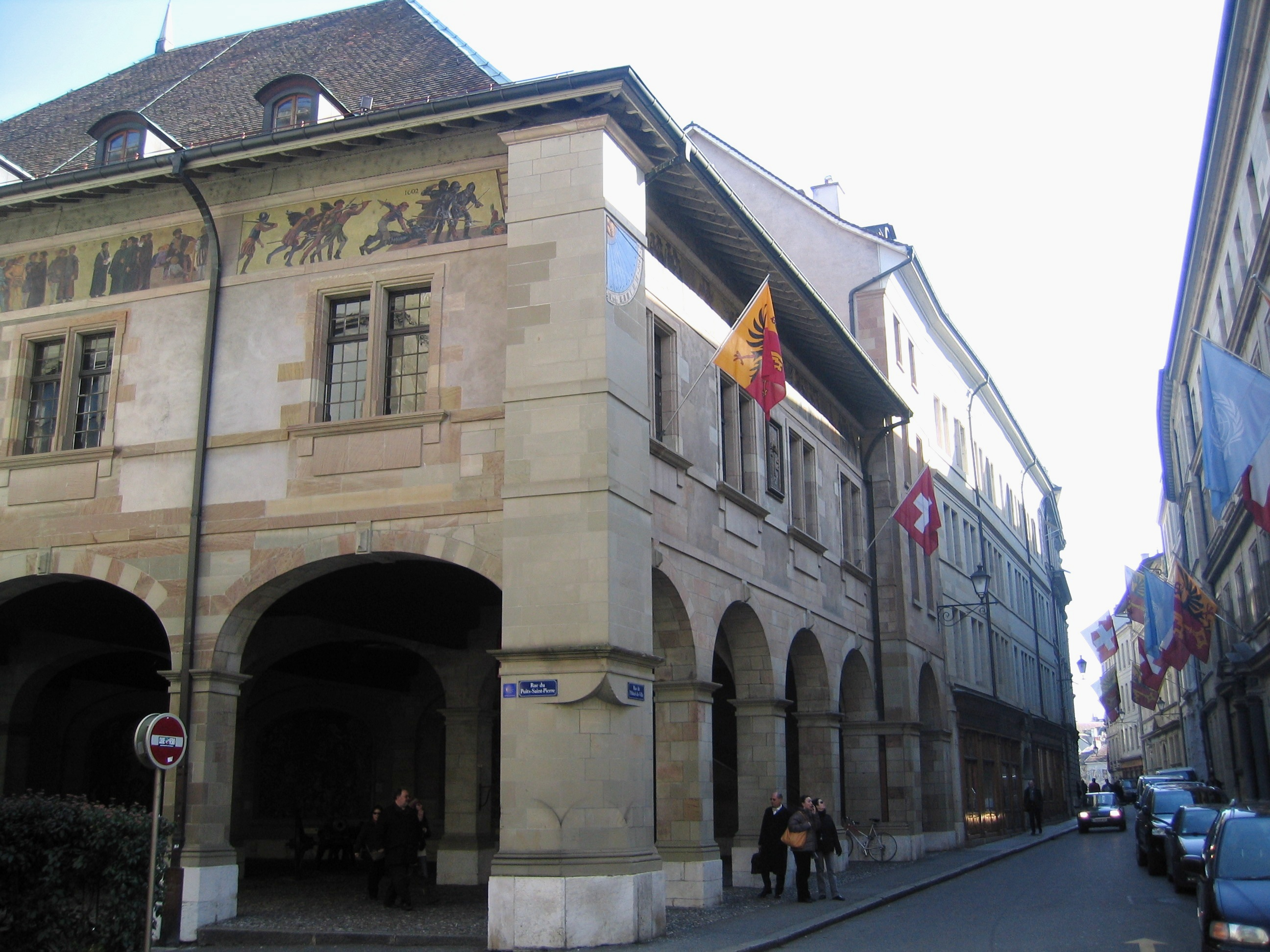 Suisse Geneve Arsenal